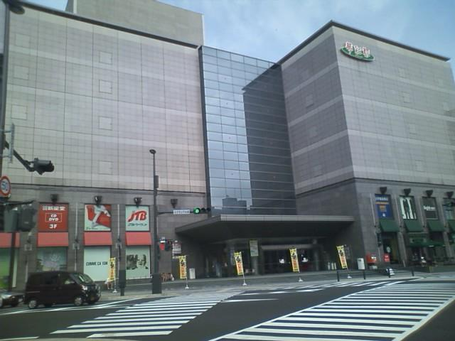 長崎港に隣接する商業施設